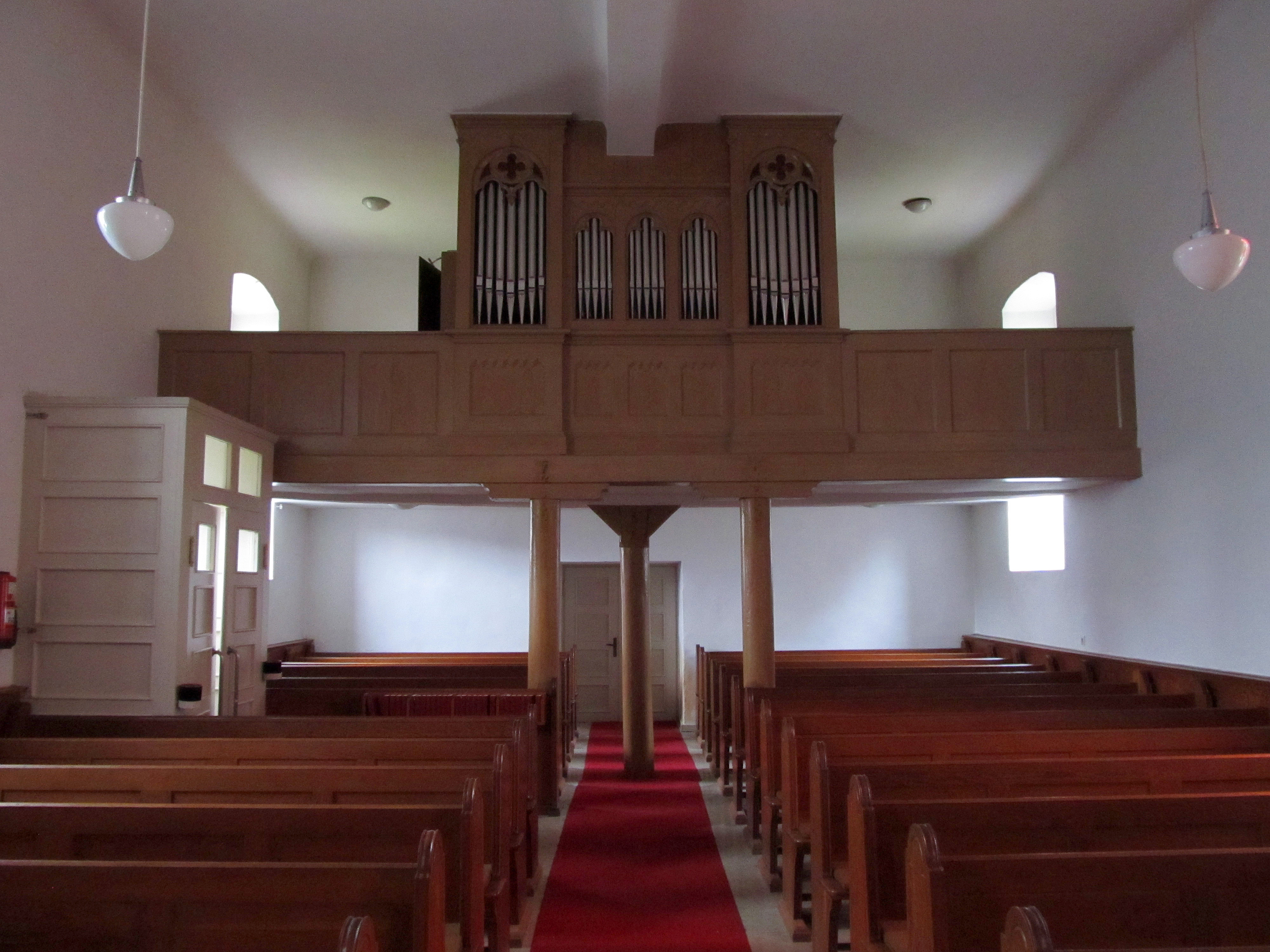 Blick ins Innere der protestantischen Kirche in Wolfersheim, einem Stadtteil von Blieskastel, Saarland